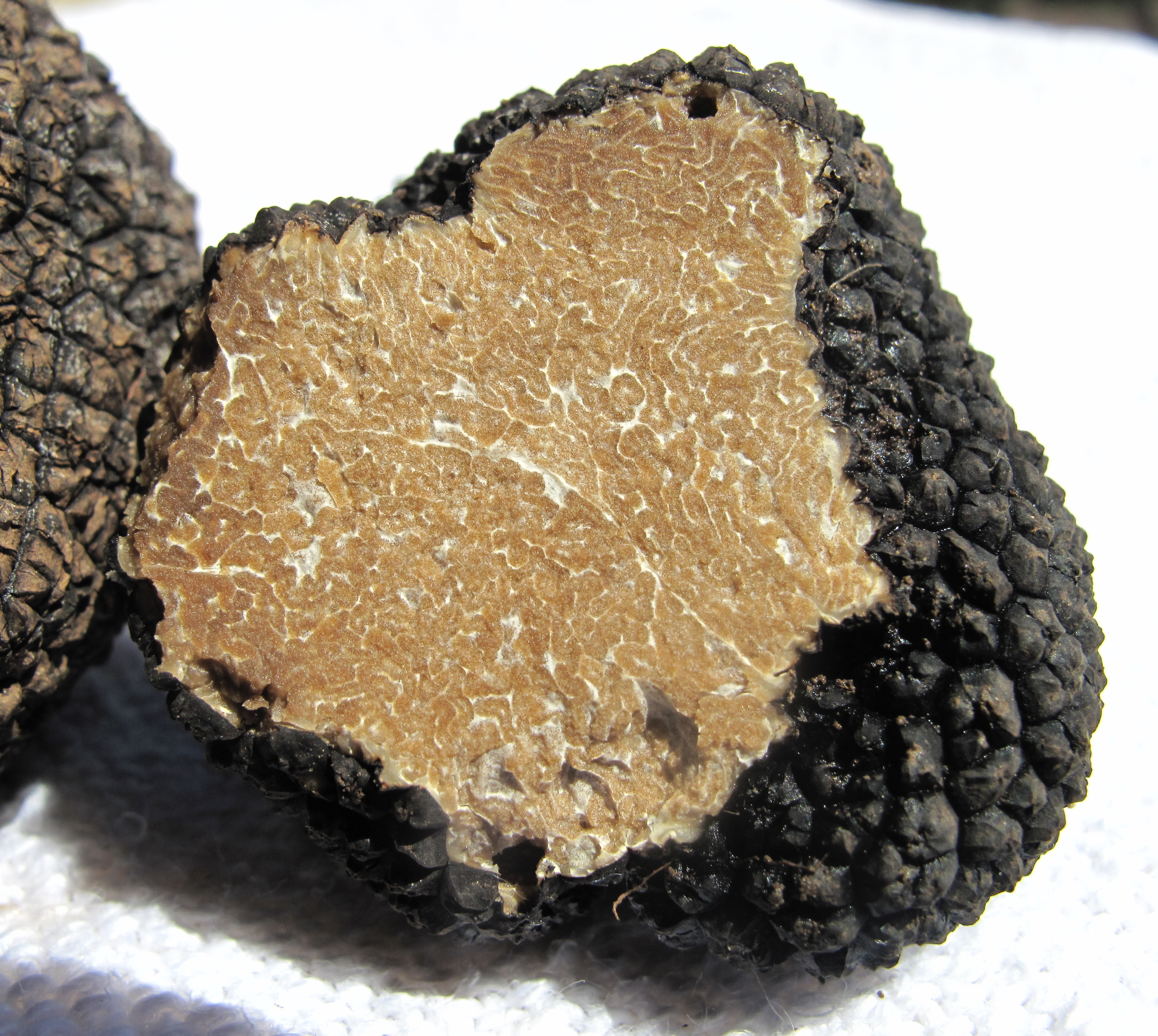 Tartufi neri estivi trovati in Valnerina il 17-07-2010